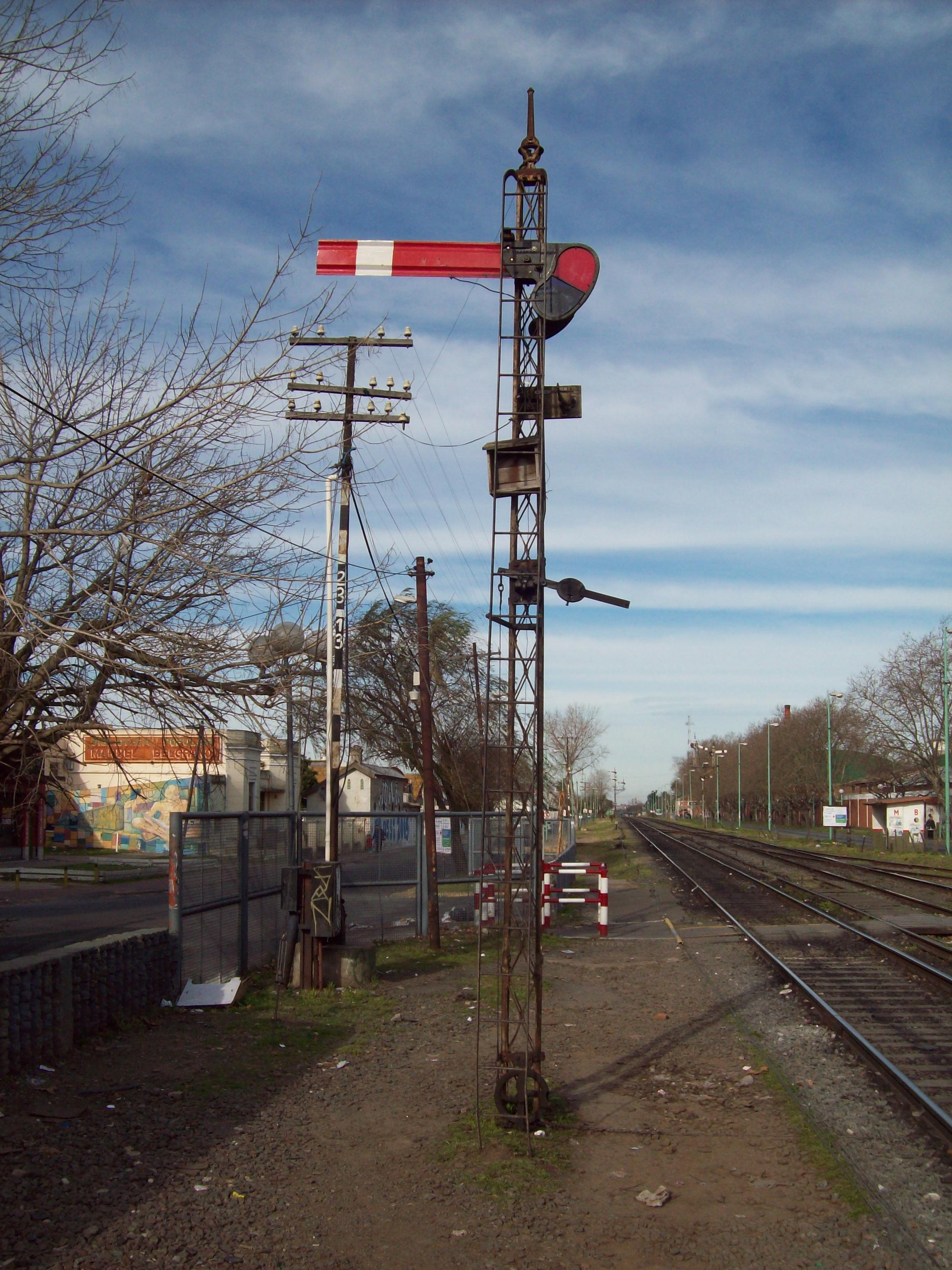 Señal ferroviaria mecánica absoluta a la salida de la estación Berazategui, localidad de Berazategui, ciudad de Buenos Aires, Argentina.